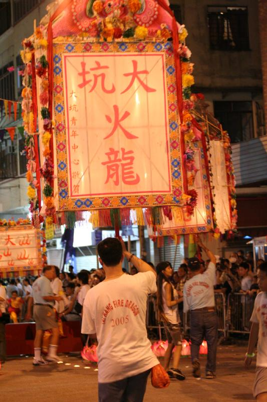 Tai Hang Dragon Dance, Hong Kong by User:Lin IVY Chan